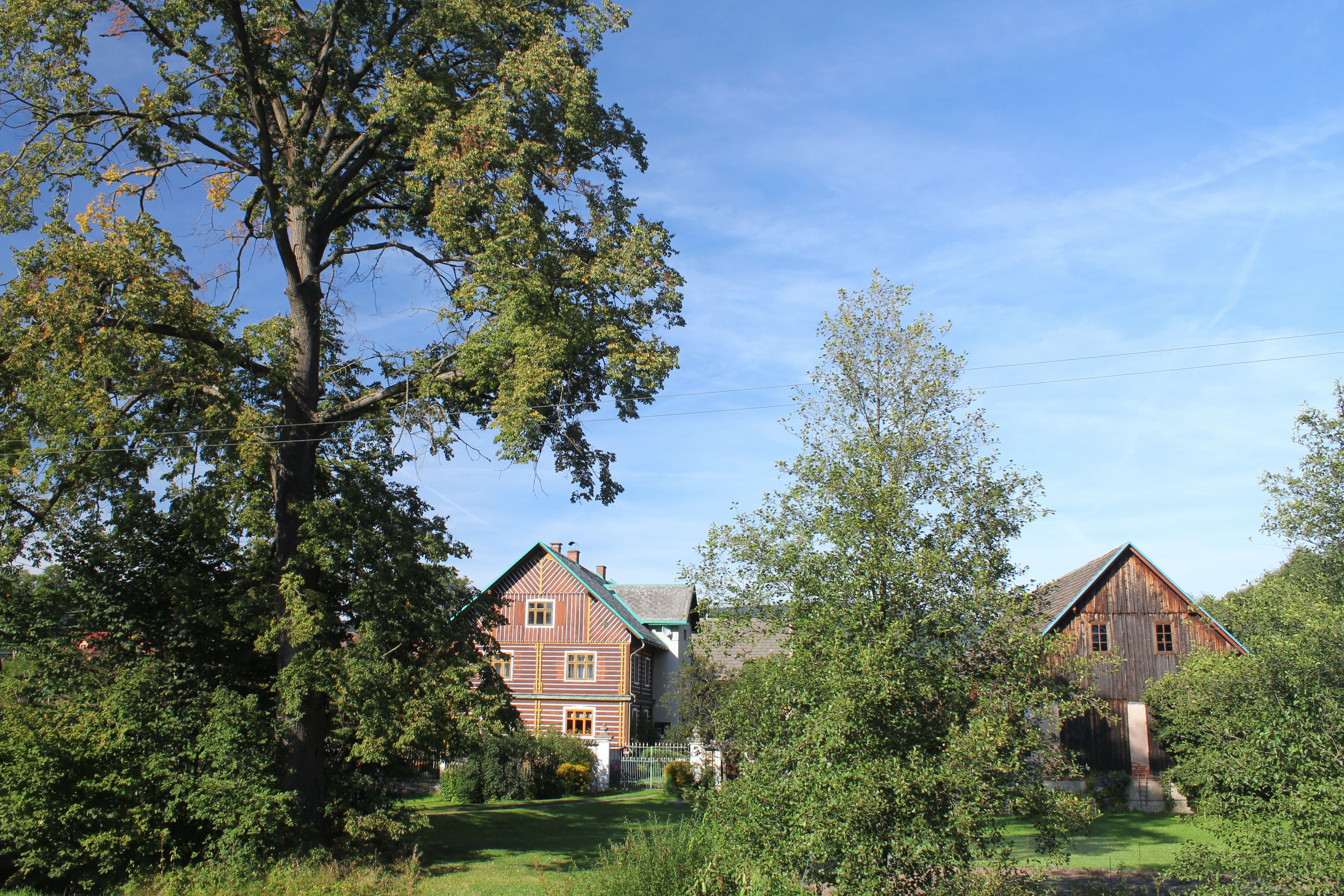 Petrašovice